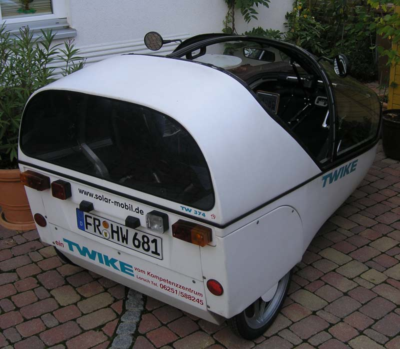 Twike Eigene Aufnahme Freiburg 2006